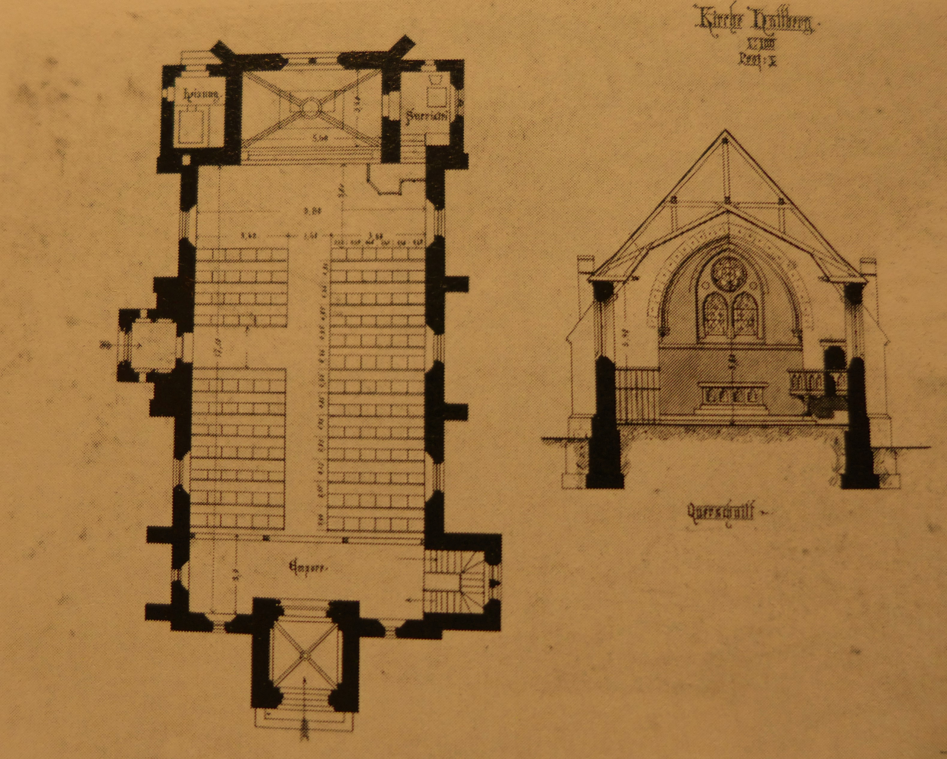 Stumm-Kirche, Neogotischer Entwurf, Grundriss und Apsis (innen)